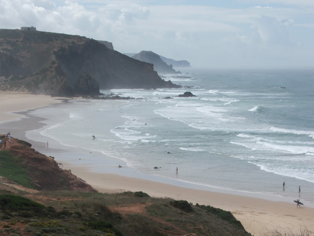 Beach Bordeira Portugal Algarve